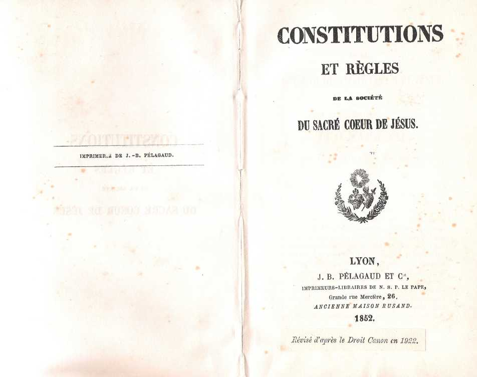 Madeleine-Sophie Barat Constitutions de 1852